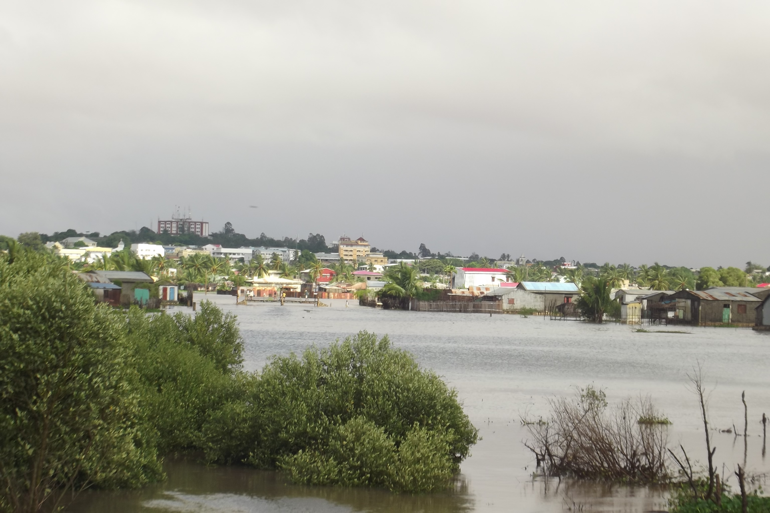 Lagune inondable au centre de l'agglomeration, en periode de vives eaux, apres le passage du cyclone Hellen en Mars 2014